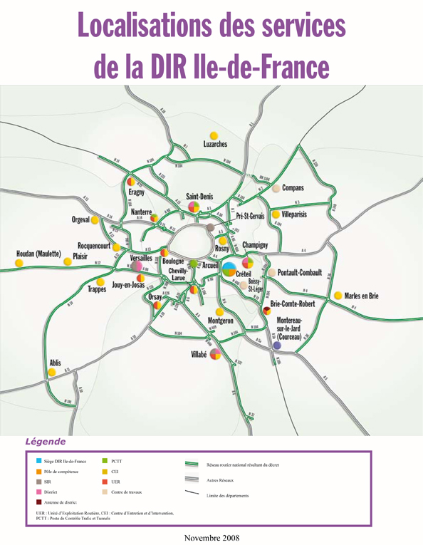 la dirif